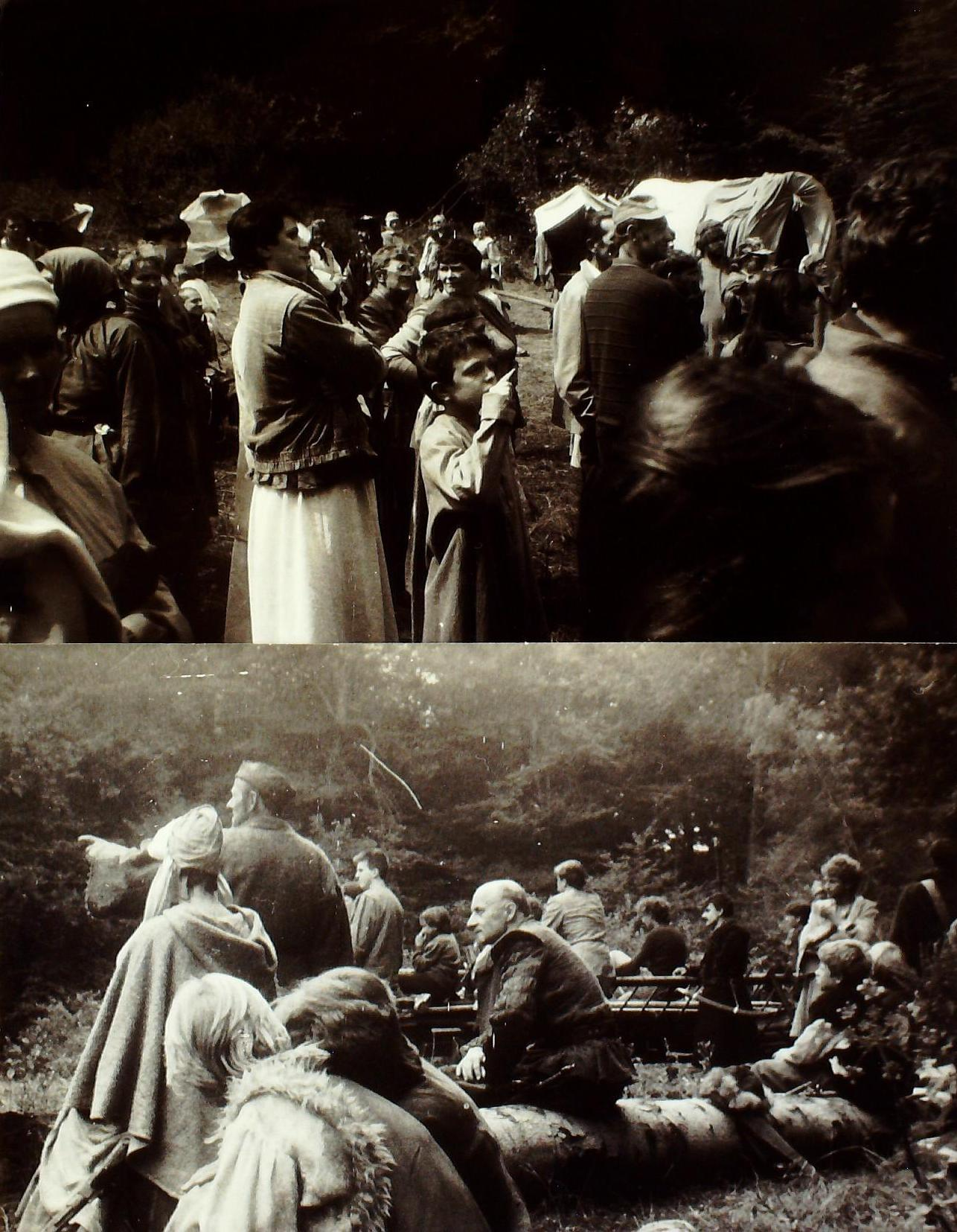 Marek Walczeski während der Dreharbeiten an Crimen in Gruszka n. Lesko